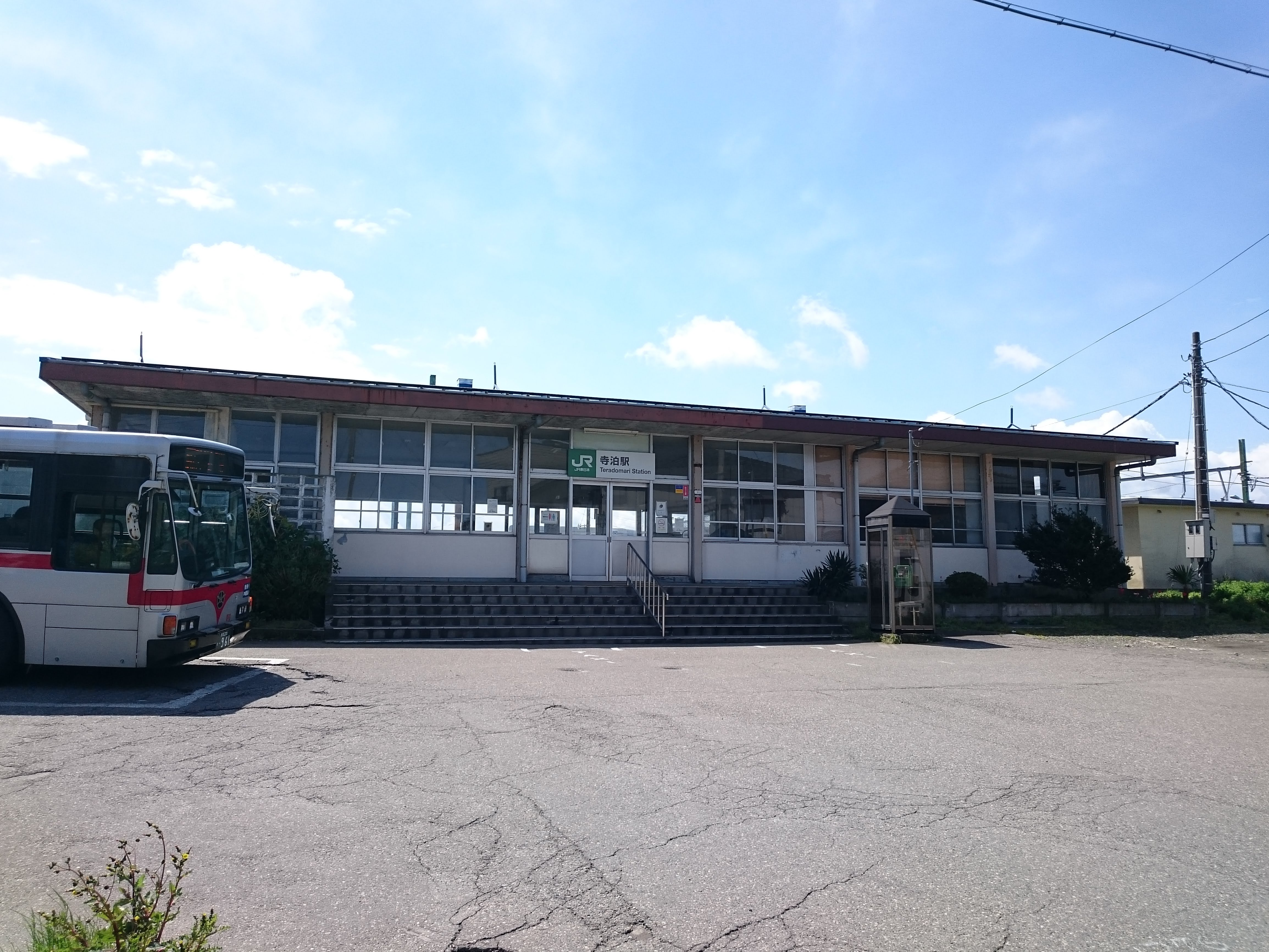 寺泊駅の駅舎外観